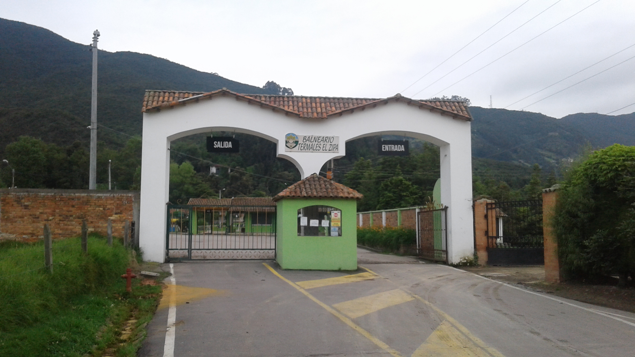 Entrada al Balneario Termales del Zipa (Tabio, Cundinamarca, Colombia)